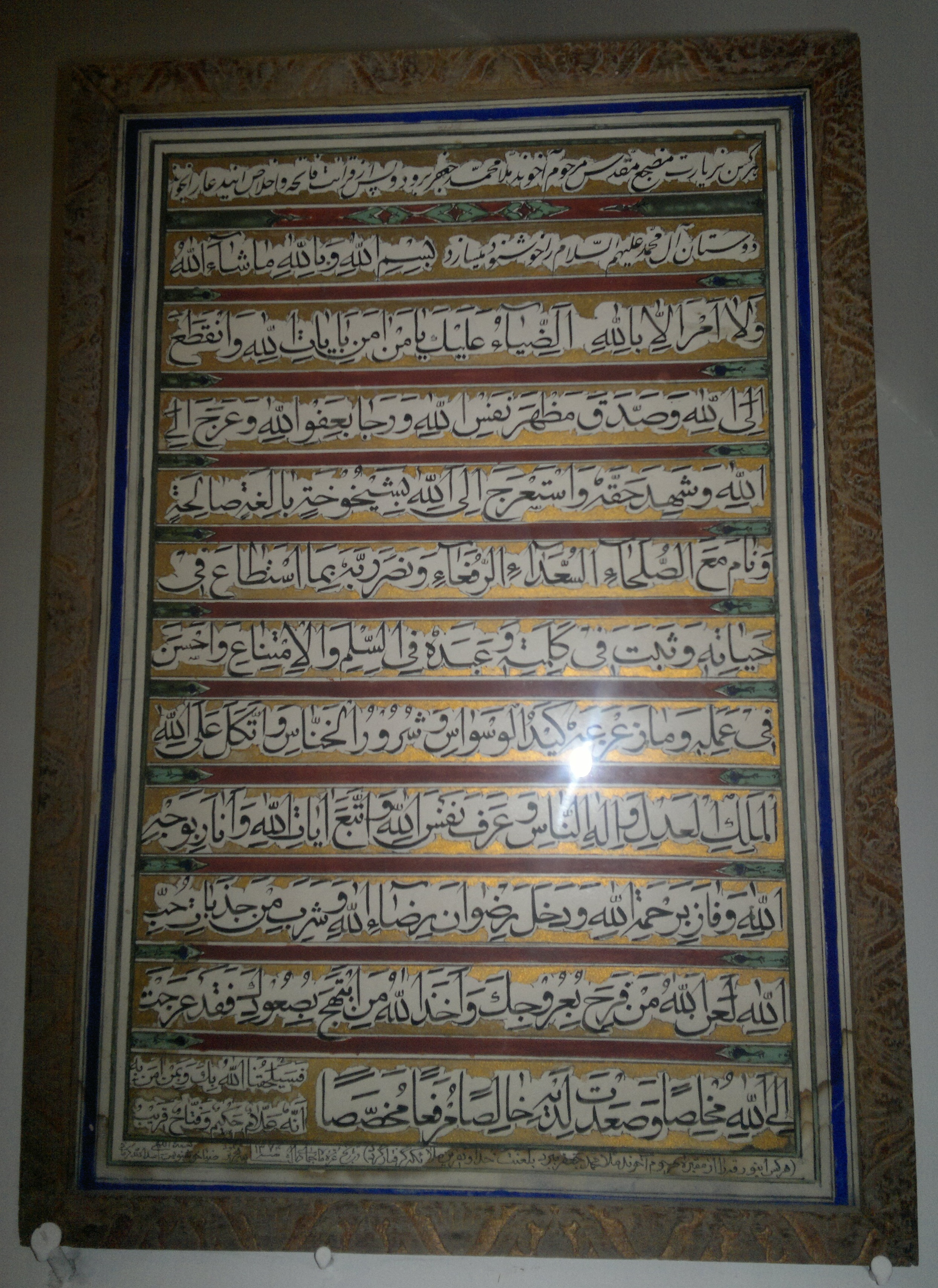 زیارت نامه روی دیوار مقبره ملا محمد جعفر کرمانی - شیخ العلماء شخصا این تصاویر را در مهر ماه 1393 گرفته ام.